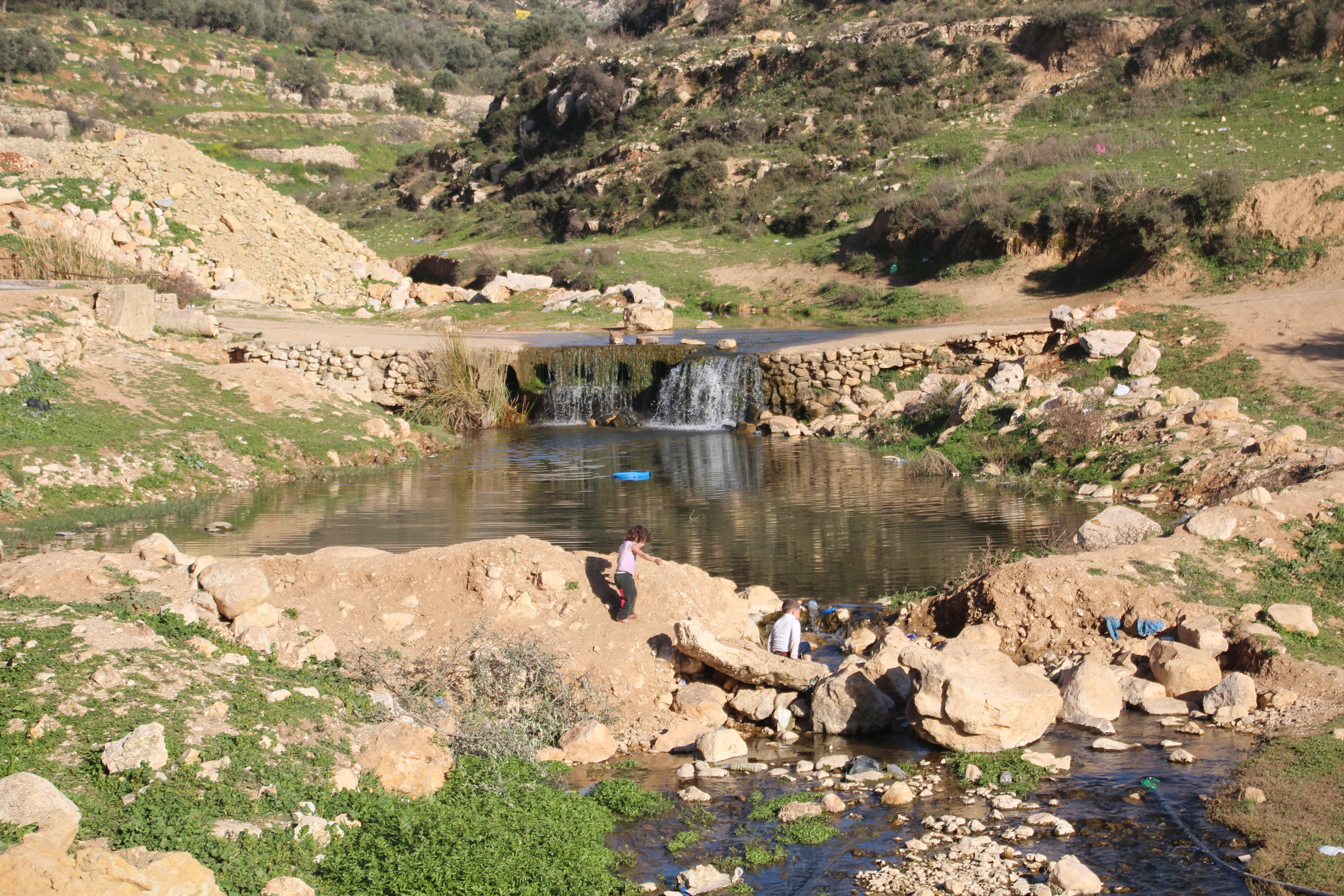 صورة من طبيعة عين قينيا